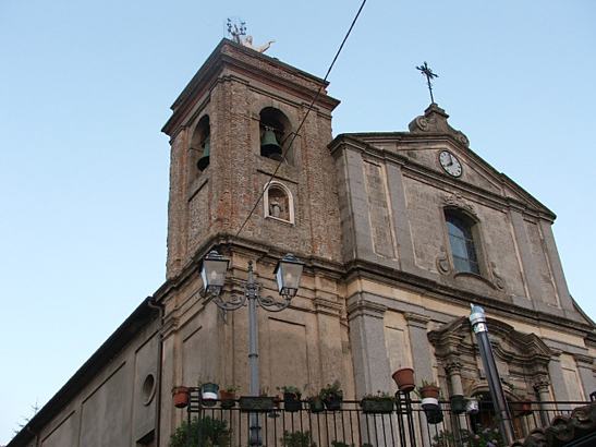 Le chiese di Spadola sorgono sul colle detto “Minerva”, in cima al quale, in età pagana, sorgeva un luogo di culto forse dedicato a questa dea (la chiesa della Madonna dei Sette Dolori è quella sita più in alto ed è chiamata di Santa Maria sopra Minerva, l’altra è la chiesa di San Nicola). Infatti, in passato, alcuni scavi nei pressi di Spadola portarono alla luce una statua di pietra calcarea della dea Minerva e altri pezzi antichi. Questo ritrovamento ha dato conferme agli storici sul fatto che, questo centro, fosse abitato già ai tempi della Magna Grecia. Spadola oggi, se non fosse per le sue due chiese, l'una a ridosso dell'altra sulla sommità della collina, sembrerebbe un grosso agglomerato di case, attaccato com'è ai paesi vicini di Brognaturo e Simbario; ed il suo centro storico, con le viuzze che si insinuano tra vecchi muri muschiati dall'umido, e le nuove costruzioni che si aprono con ampio respiro nella zona pianeggiante del prato, si mostrano all'occhio del visitatore solo quando è nei pressi dell'abitato.